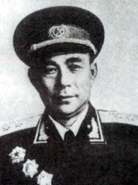 刘飞将军1955年受勋照